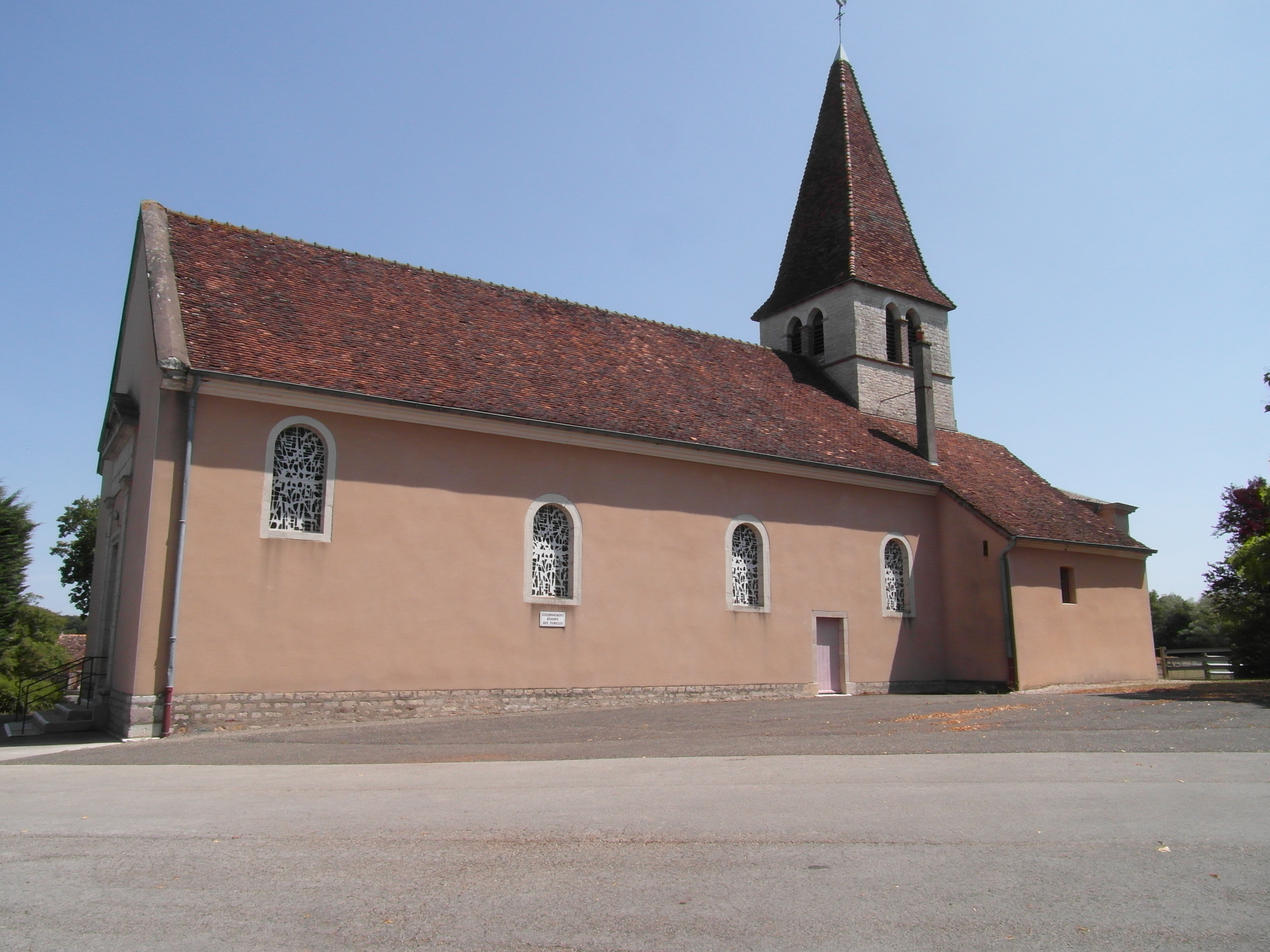 Eglise de Chateaurenaud